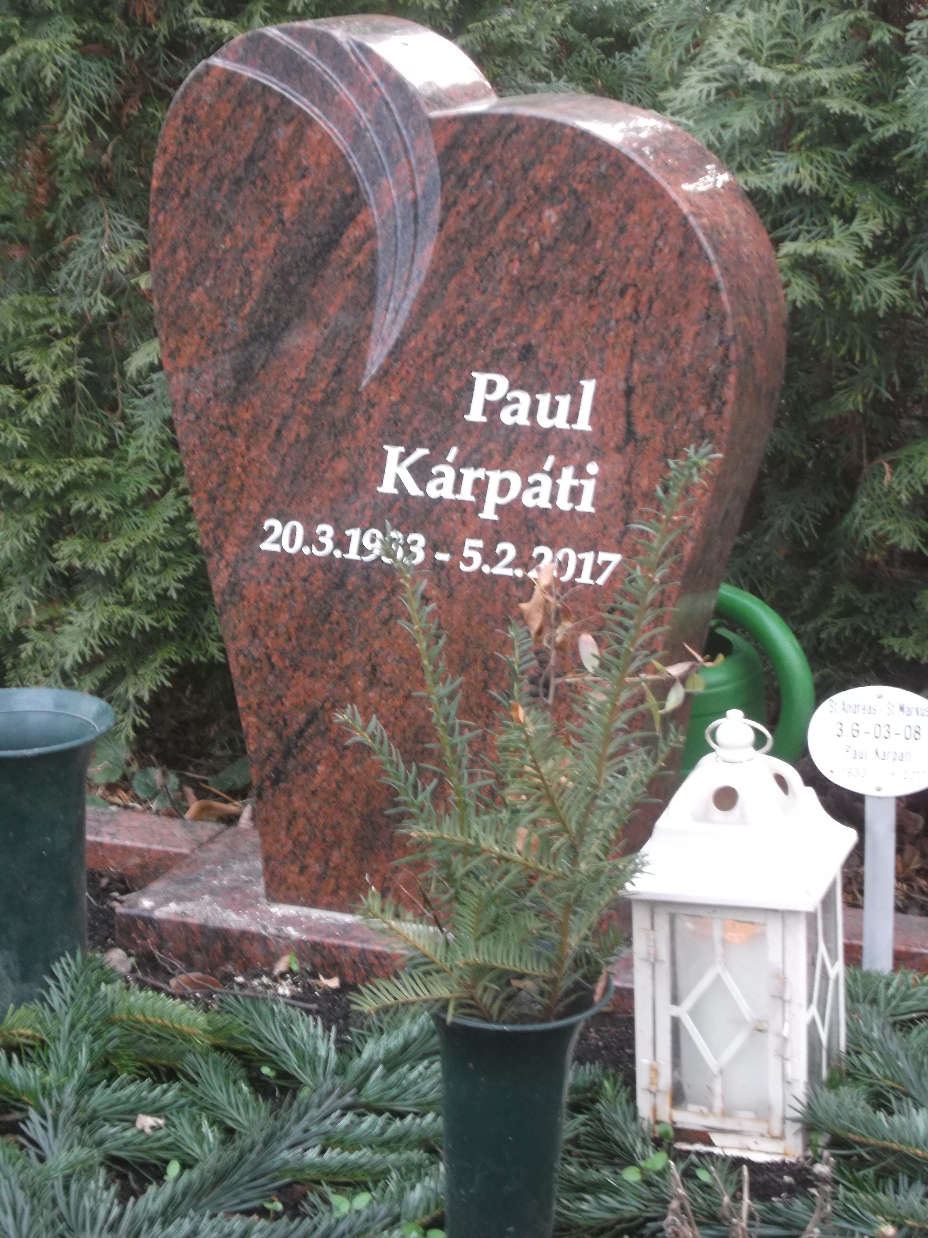 Grab in Berlin Hohenschönhausen